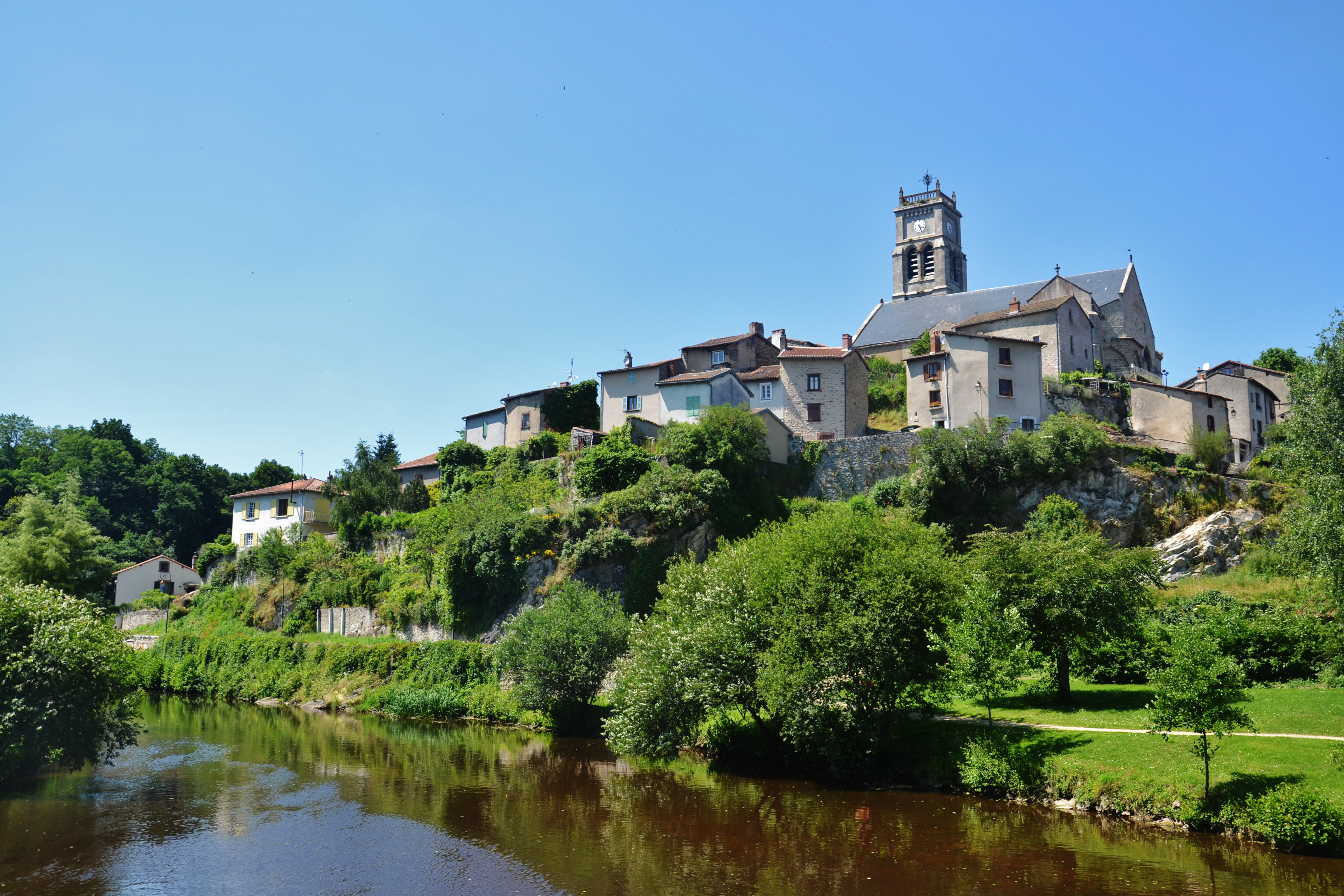 Le Vincou passant sous la vieille ville de Bellac (Haute-Vienne, France)